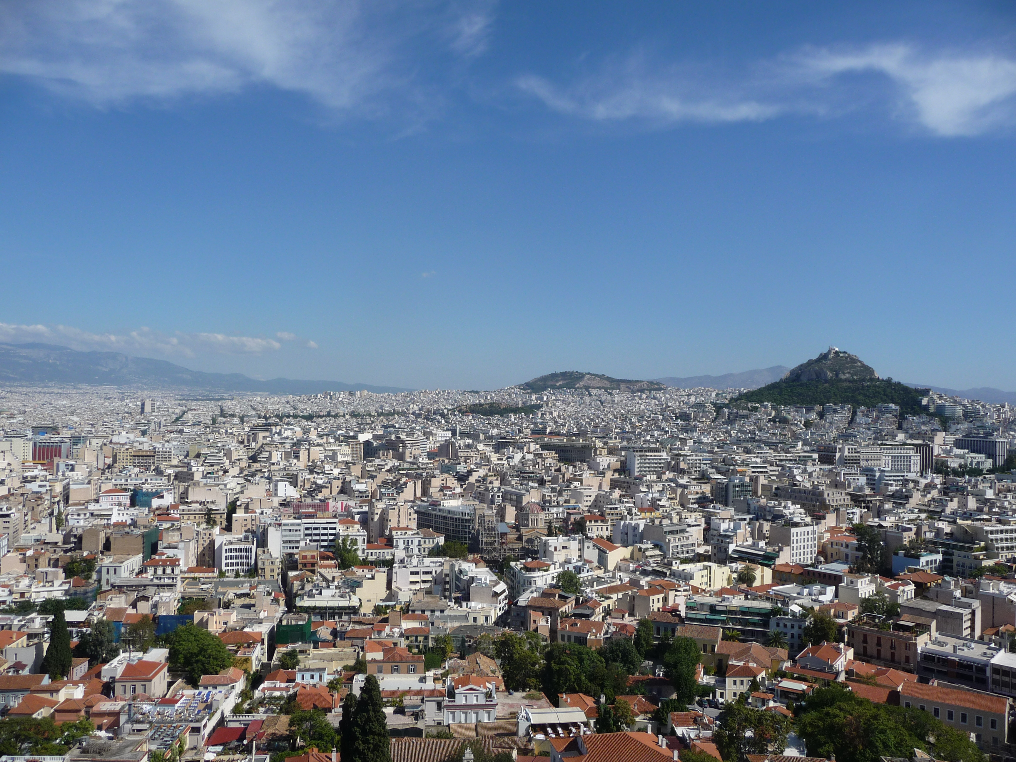 Panorama von Athen mit Likavitos